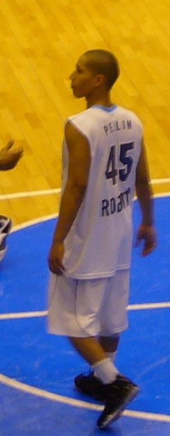 Le joueur français de basket-ball Marc-Antoine Pellin lors d'un match Euroleague (Clermont-Ferrand)